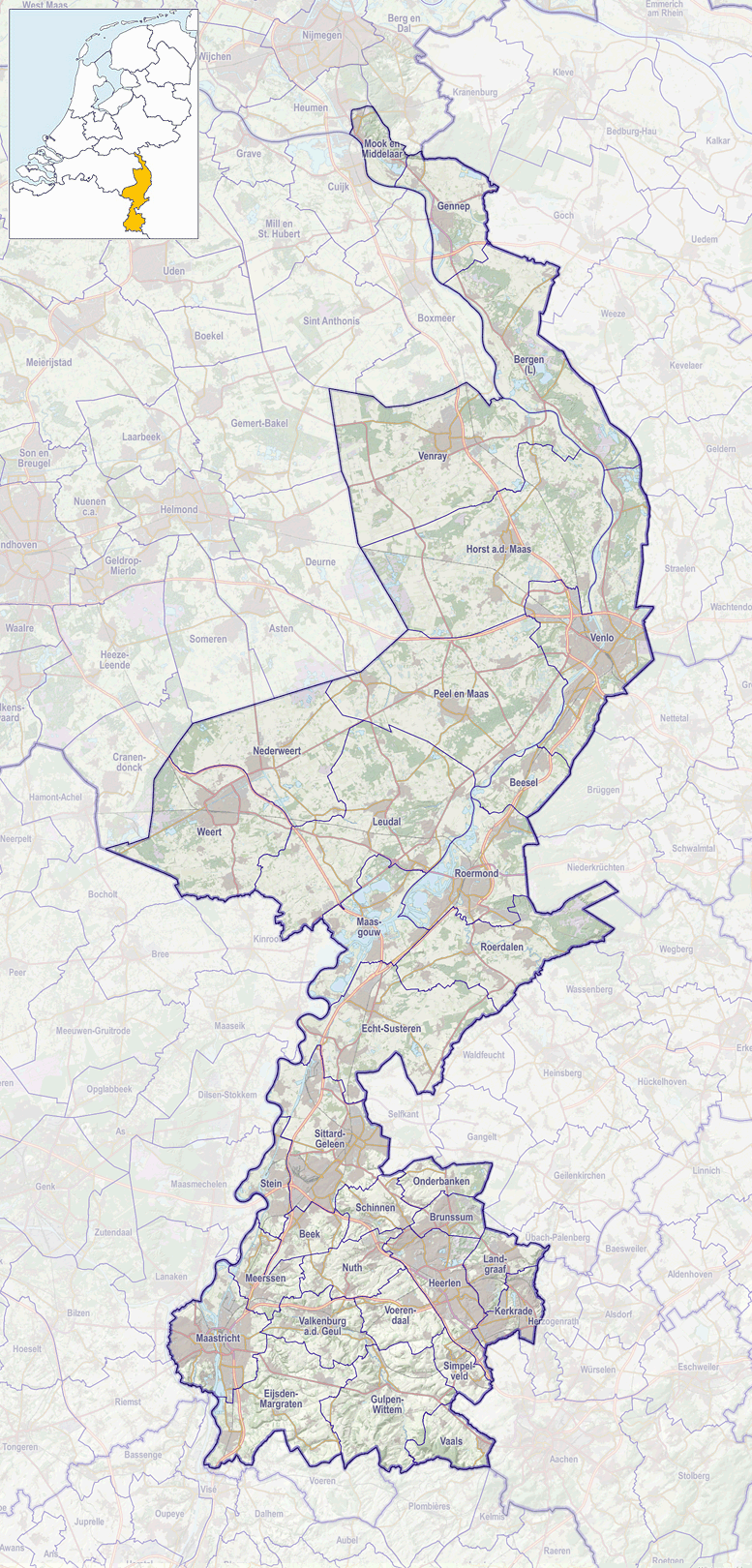 Positiekaartje van de provincie, variant "gemeentelabels"